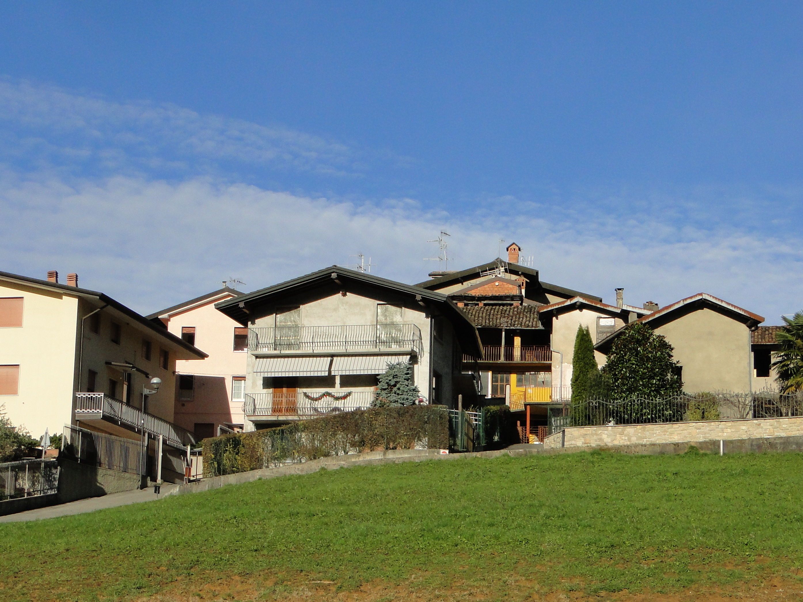 Contrada Cittadella. Peia (BG). Italy